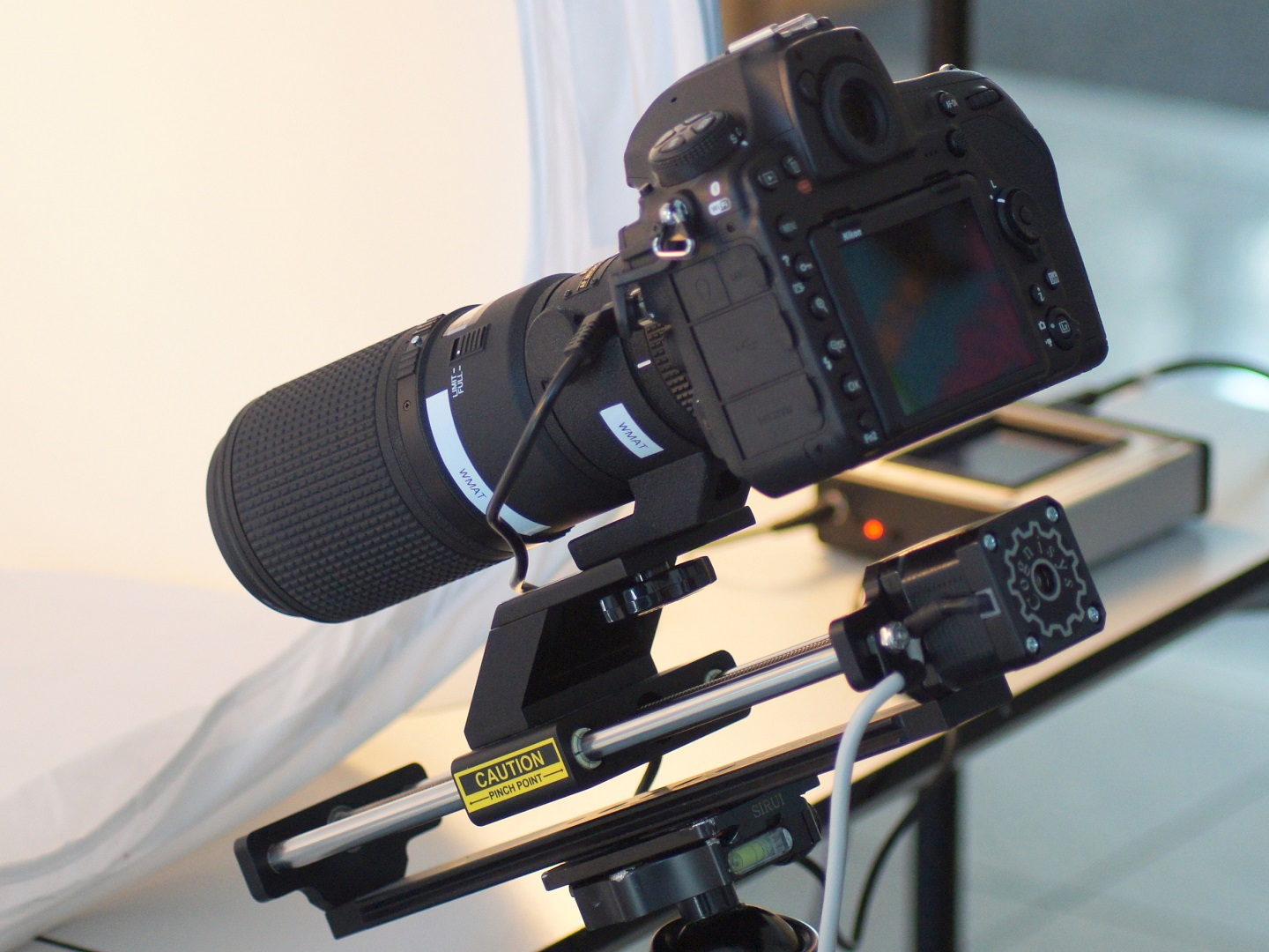 Stacking mit Hardware - Schrittmotor und externe Steuerung, Nikon D850, Variation der Objektdistanz